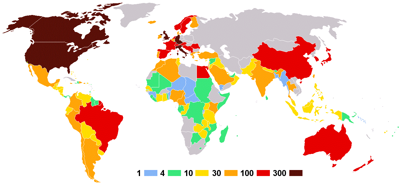 Olympische Sommerspiele 1984 — Anzahl der Athleten